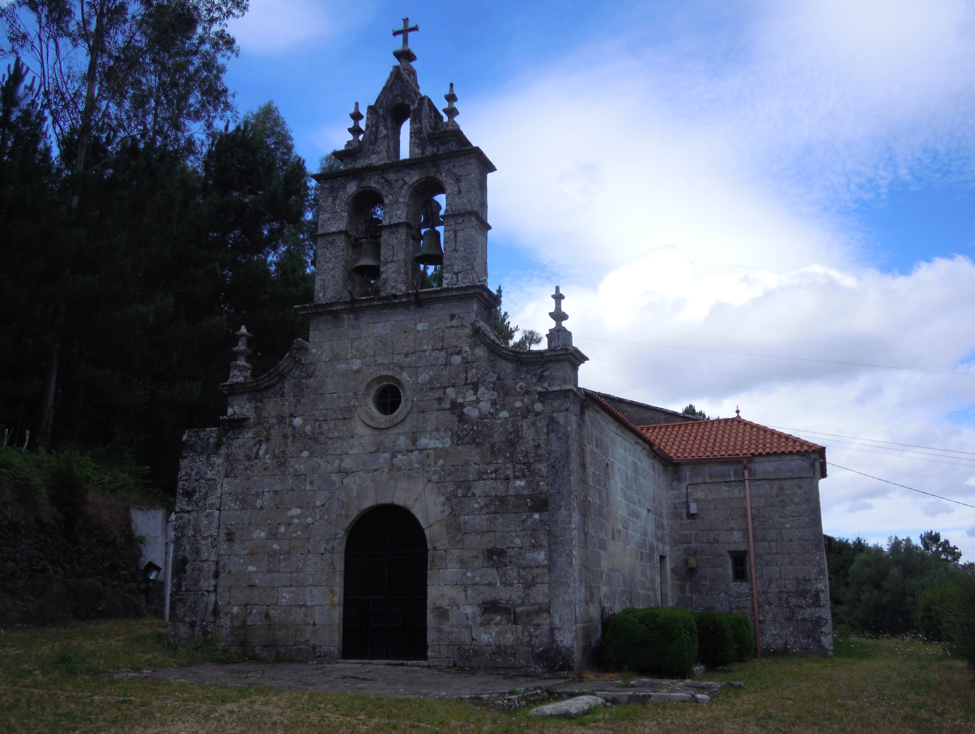 Igrexa parroquial de San Xoán de Angudes (Crecente)